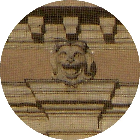 Stockholms slott, södra fasad, lejonmask under taklist, konstnär Antoine Bellette